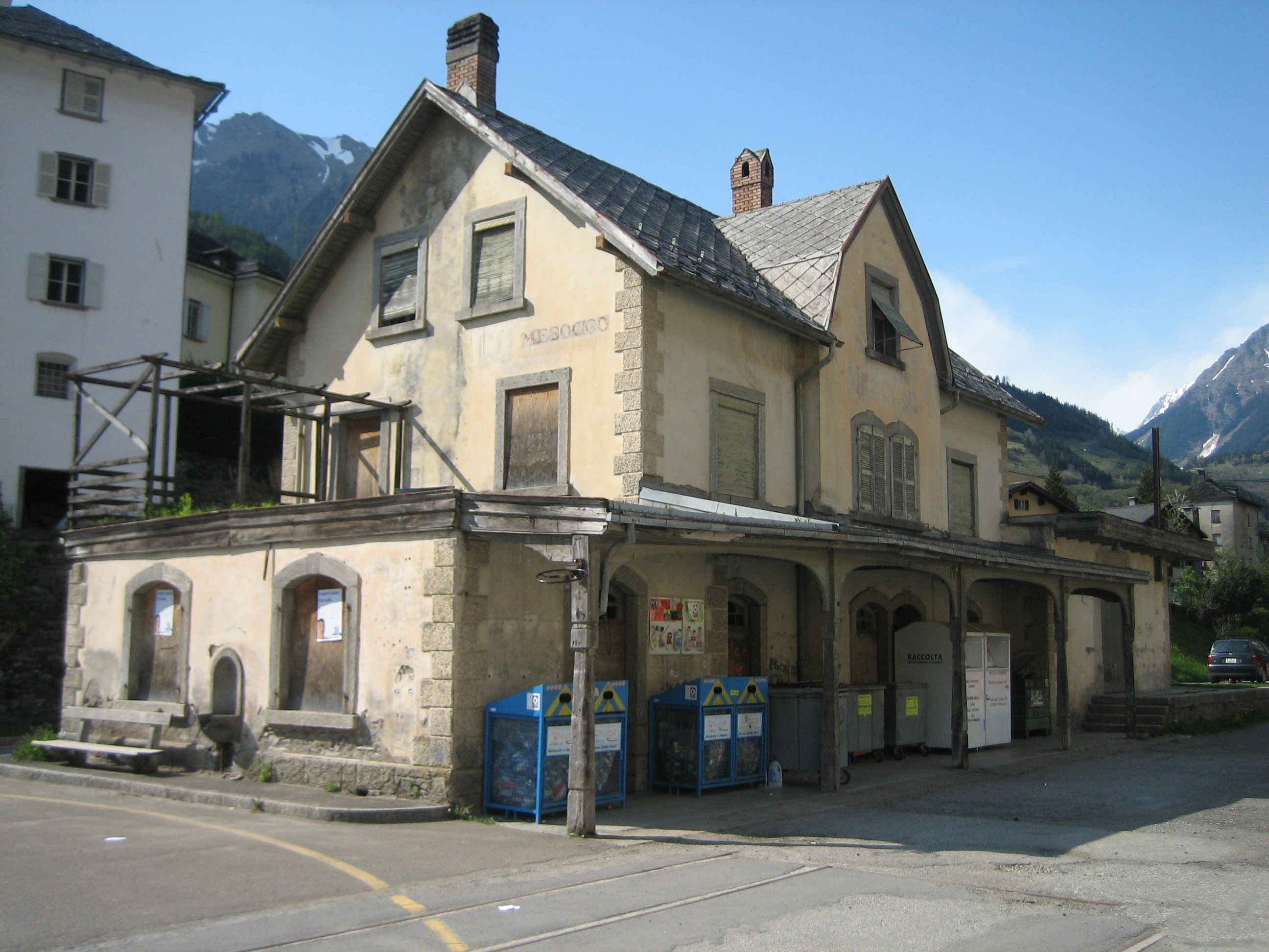 ehemaliger Bahnhof von Mesocco